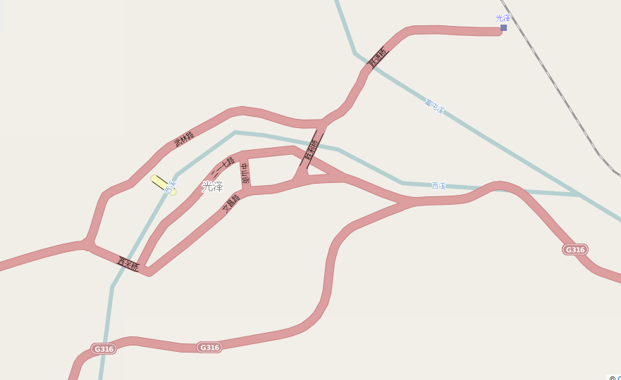 中文（中国大陆）: OpenStreetMap上的光泽县主要街道